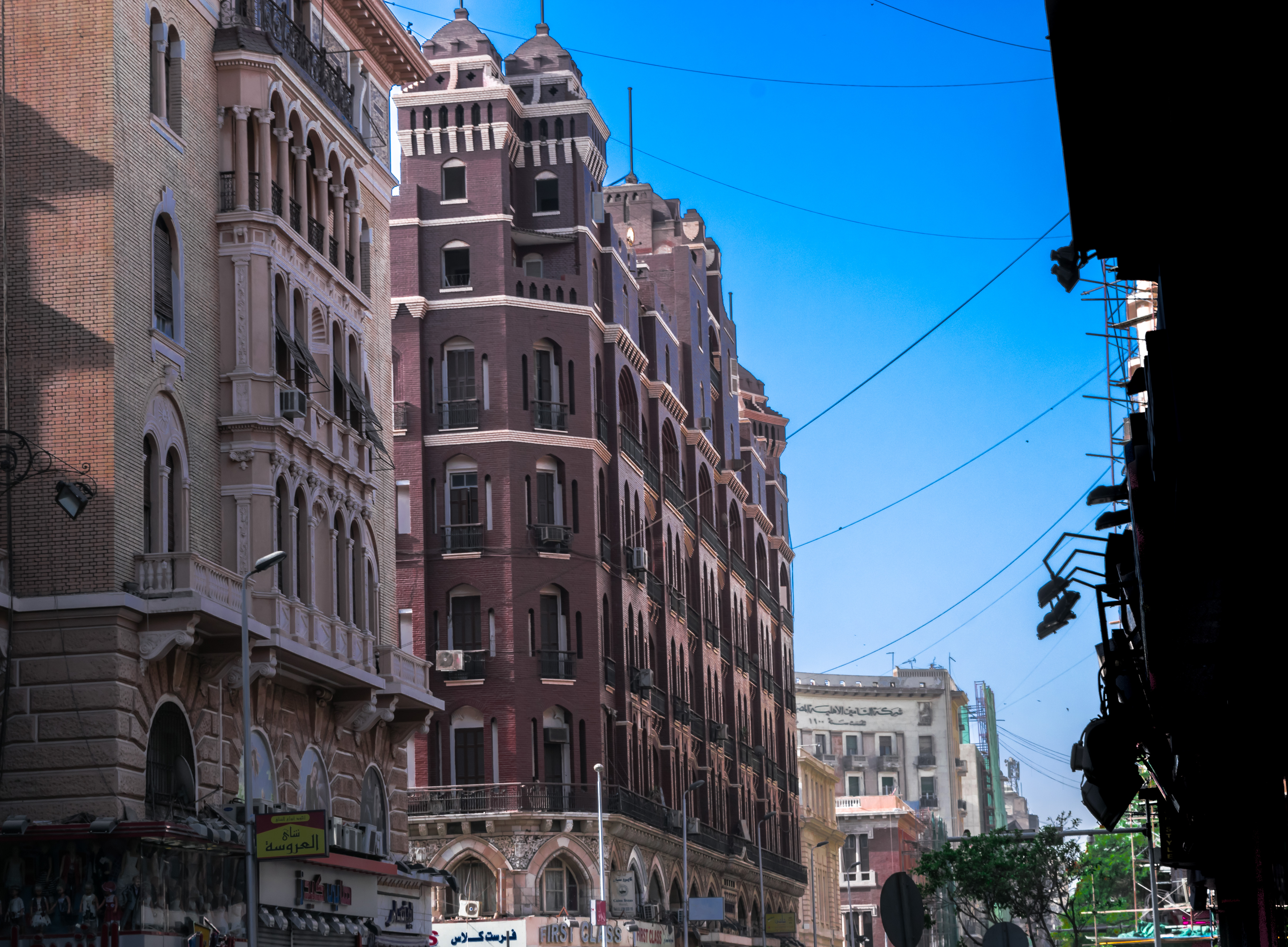 احدى عمارات وسط البلد بشارع محمد فريد